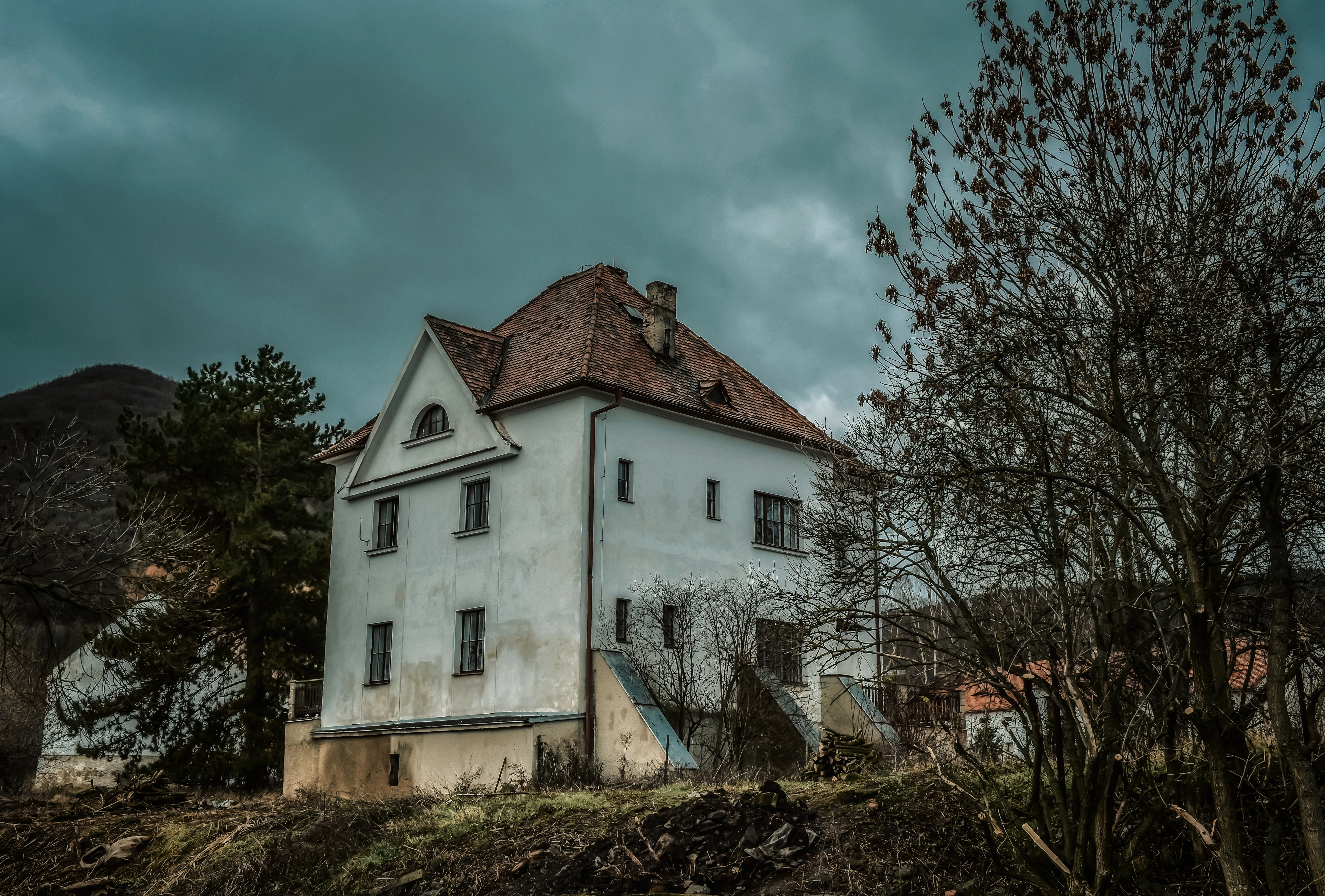 Medvědice, vila čp. 1 v hospodářském dvoře. V jejím suterénu byly roku 2007 objeveny pozůstatky tvrze.